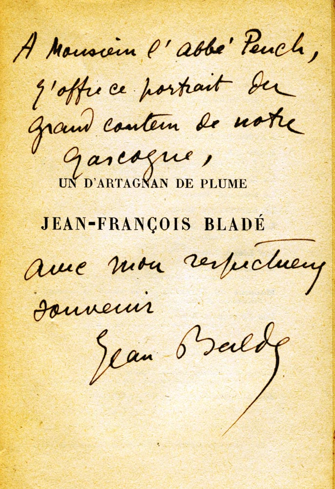 Dédicace autographe de Jean Balde sur son livre “Un d'Artagnan de plume, Jean-François Bladé”